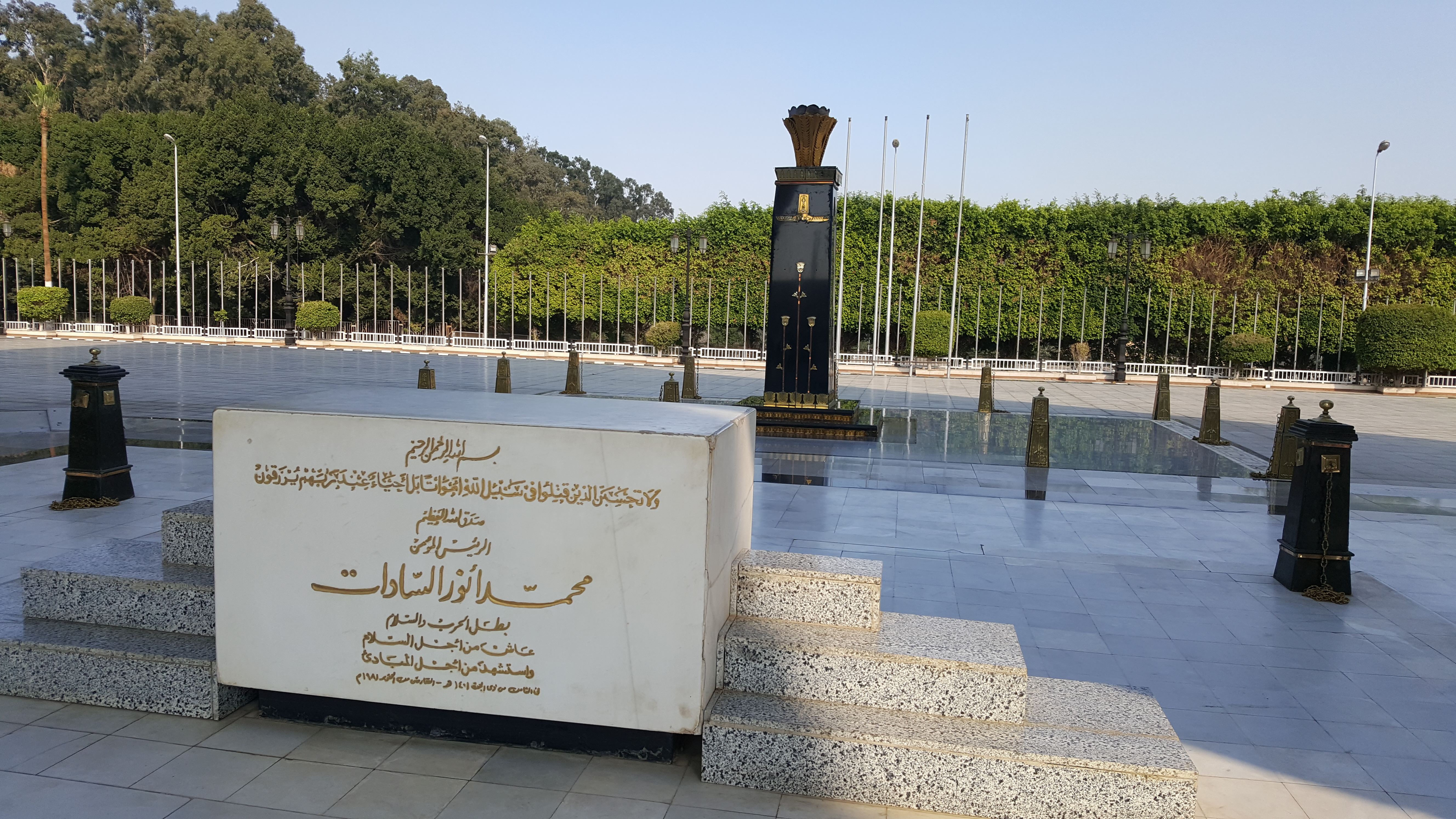 Tomb of Unknown Soldier in Cairo